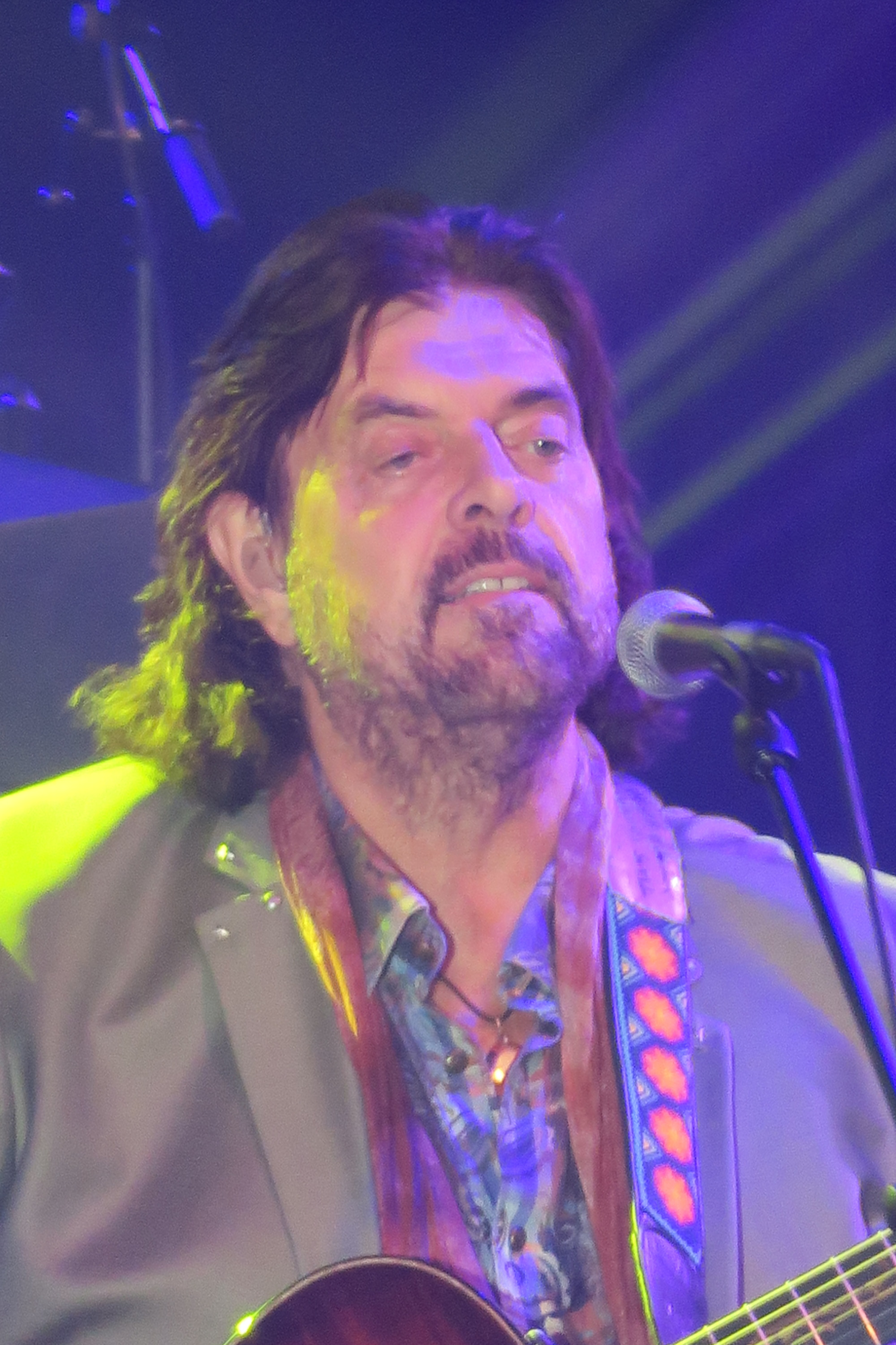 Alan Parsons, 2017-05-19, Konzert "Alan Parsons Live Project - The Greatest Hit Tour 2017, Harmonie Heilbronn